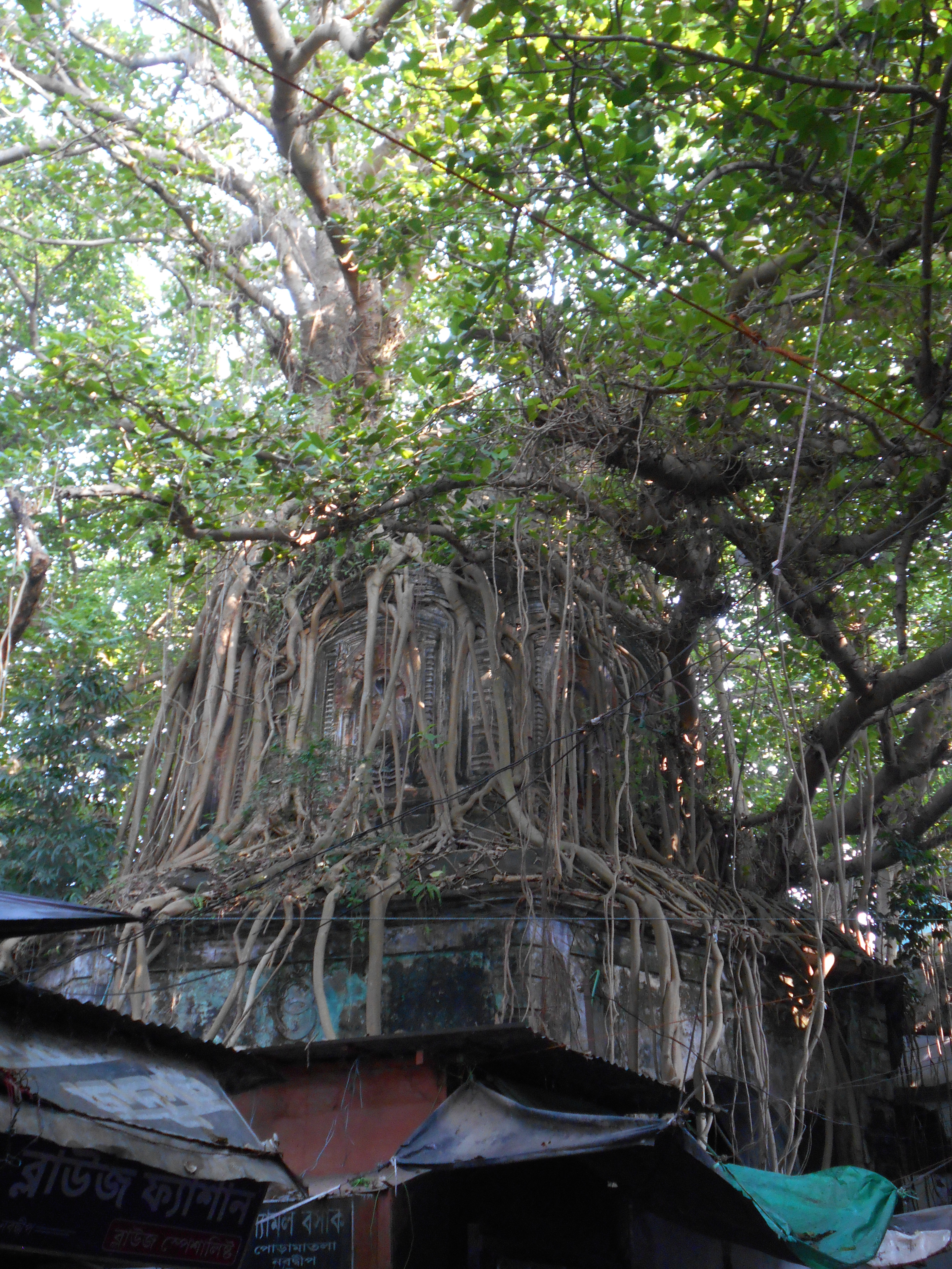 ভবতারণ শিব মন্দির